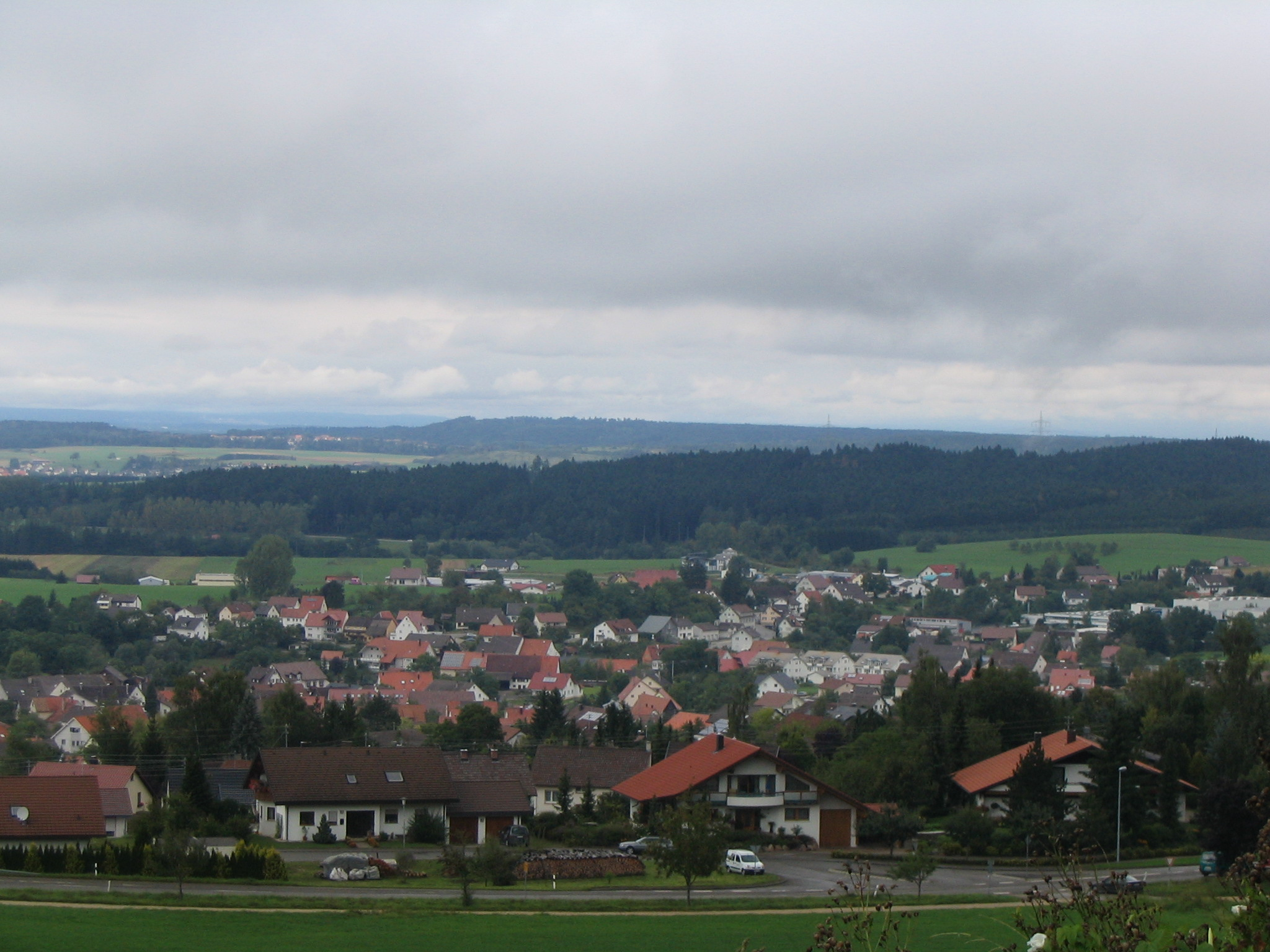 Denkingen, taken from Klippeneck